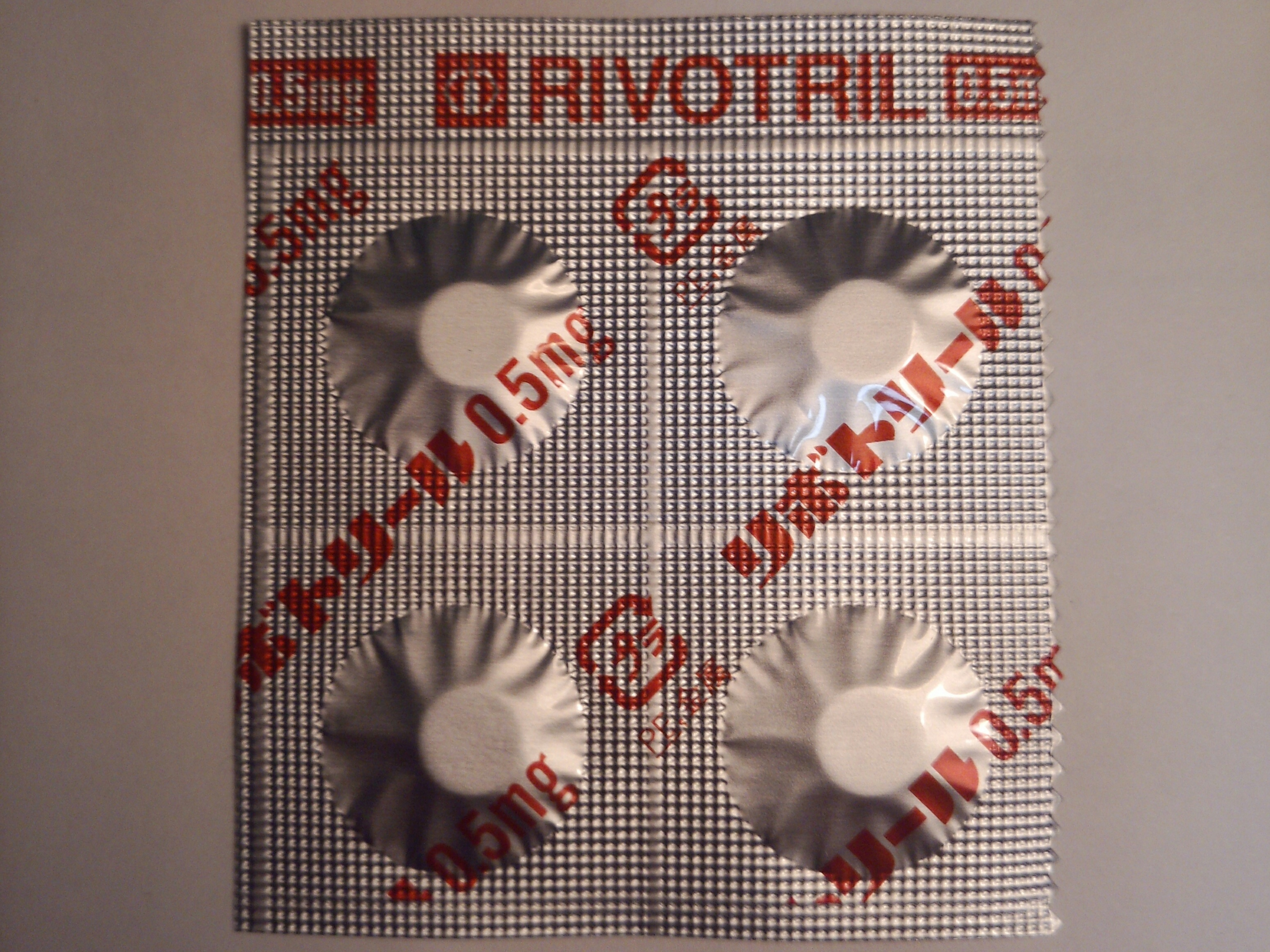 Clonazepam(RIVOTRIL-0.5mg Tab)